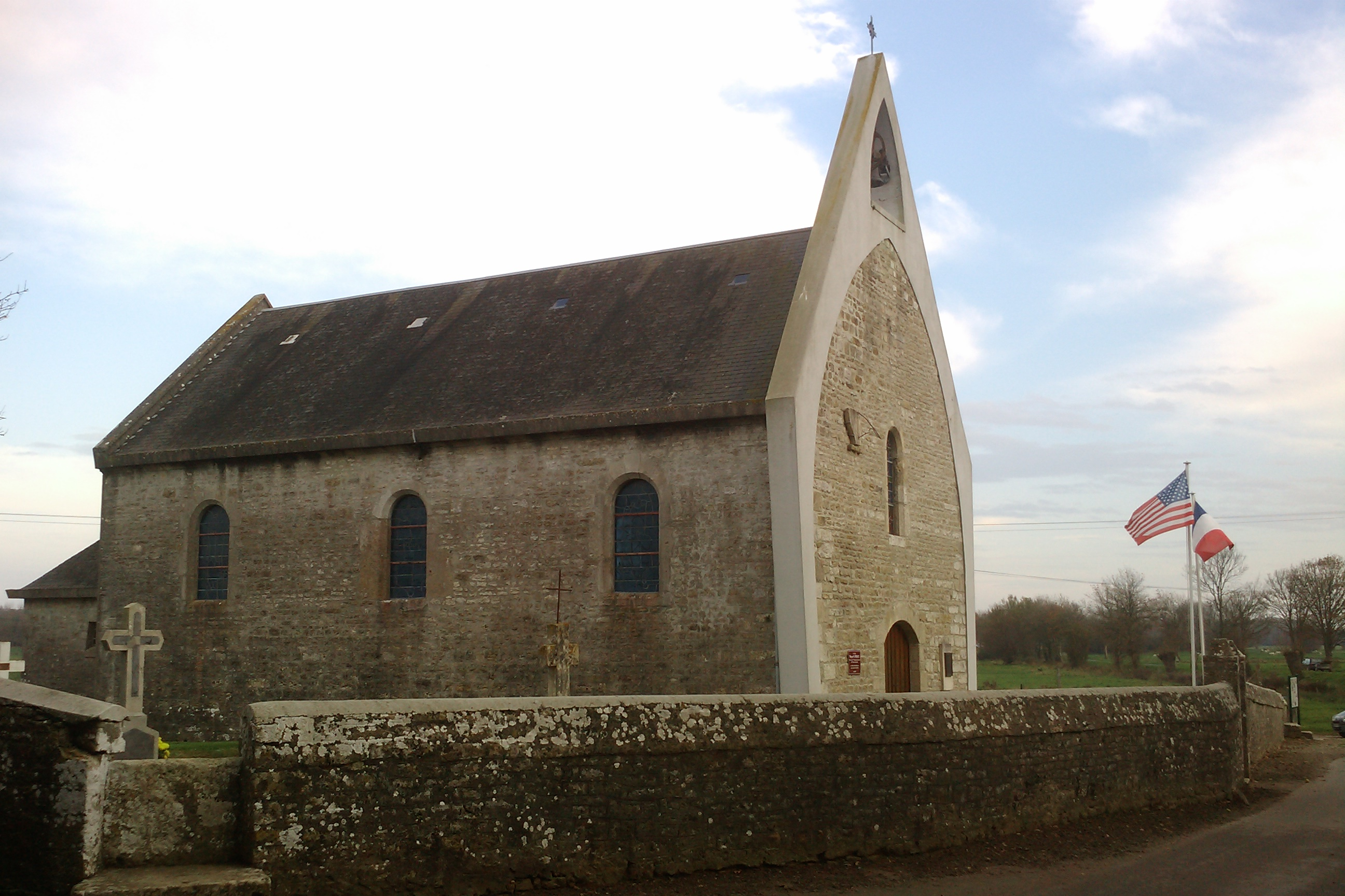 Chapelle de Cauquigny, Amfreville (Manche)